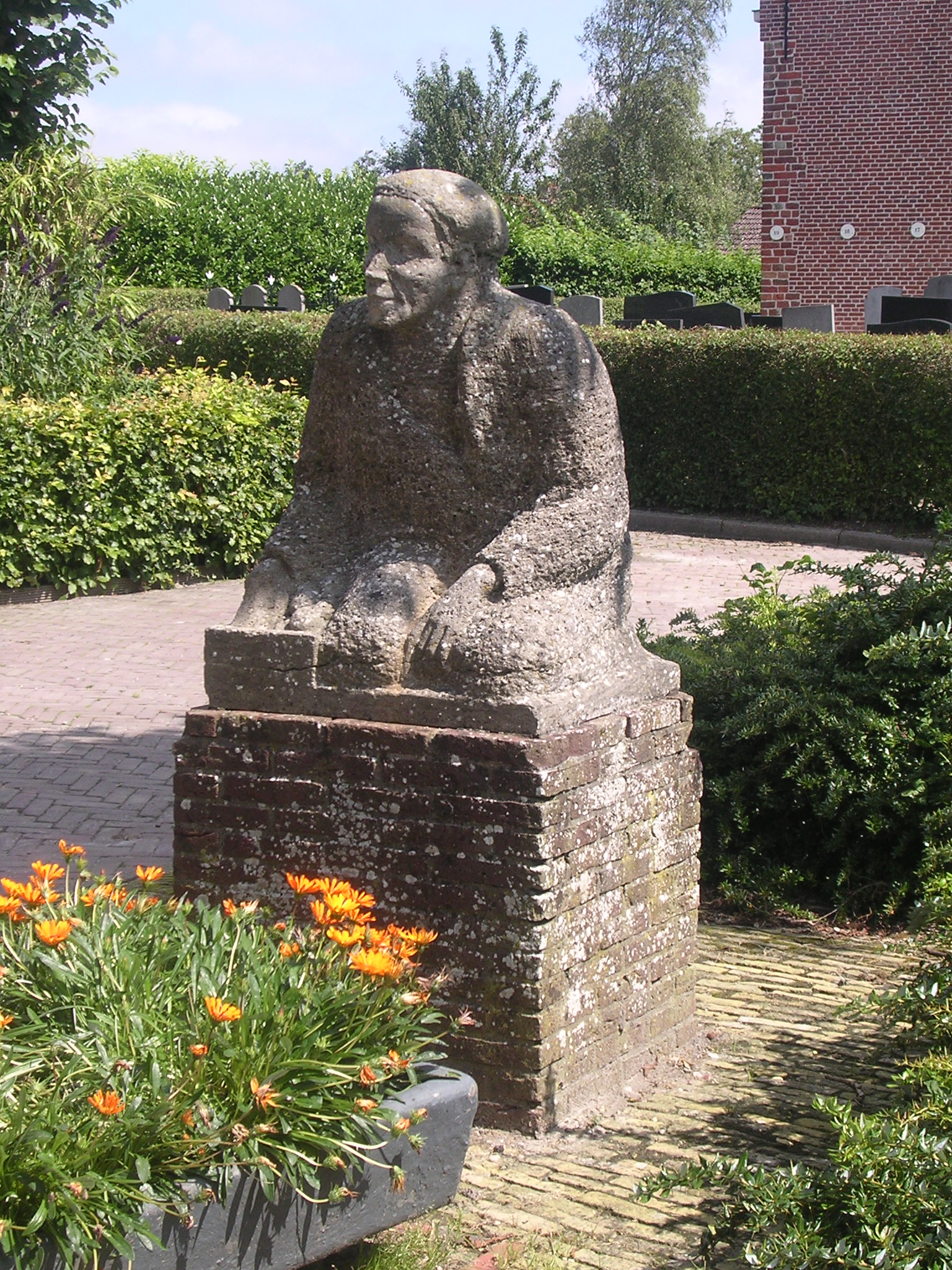 Nijewier, Anders Minnes Wijbenga